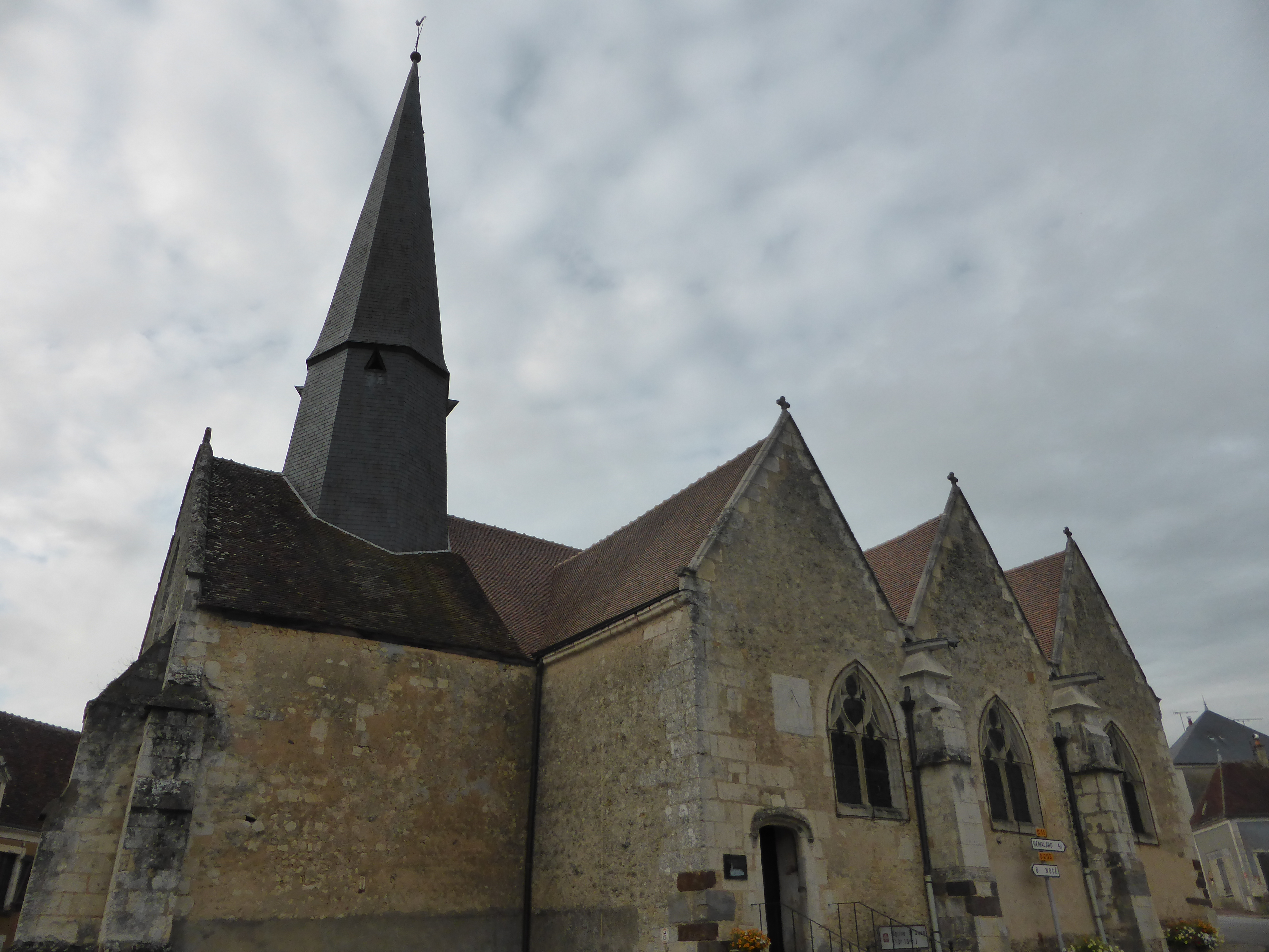 32 - Église Saint-Ouen de Vérrières, dans l'Orne. .